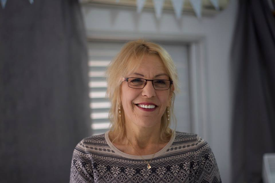 אני